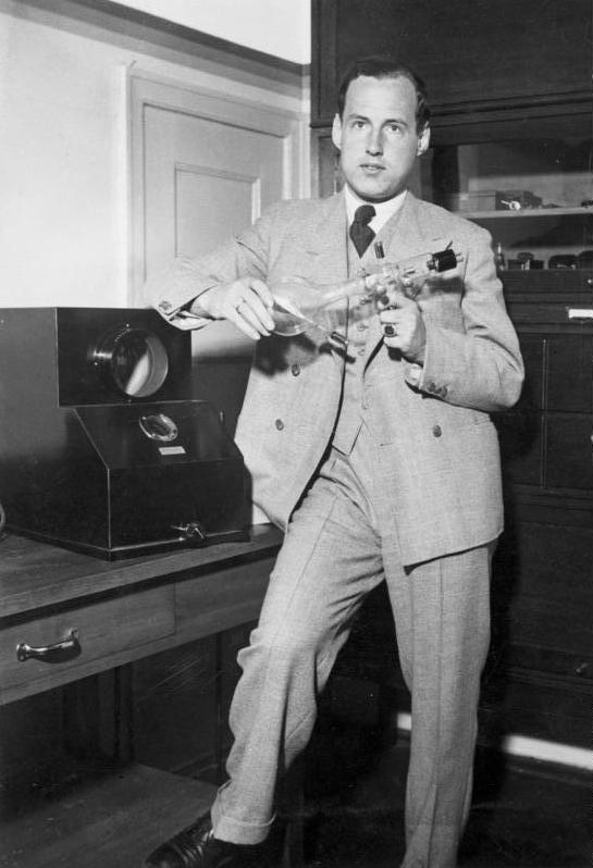 Zentralbild Prof. Manfred von Ardenne bedeutender Physiker, geb :20.1.1907 in Hamburg, seit 1955 Leiter des Forschungsinstituts "Manfred von Ardenne" in Dresden; Staatspreis der UdSSR 1947, Nationalpreis 1958. Manfred von Ardenne ist es gelungen, den Wirkungsgrad Braun'scher Röhren so zu verbessern, dass mit Hilfe eines Objektivs von der Lichtstärke 1 die damit wiedergegebenen Fernsehbilder und Messkurven eine Projektion auf Formate von 1/2 : 1/2 m zulassen. UBz: Der Erfinder mit der verbesserten Röhre, dem neuartigen Projektionsapparat bzw. der dazugehörigen Projektionsfläche. Aufnahme 1933